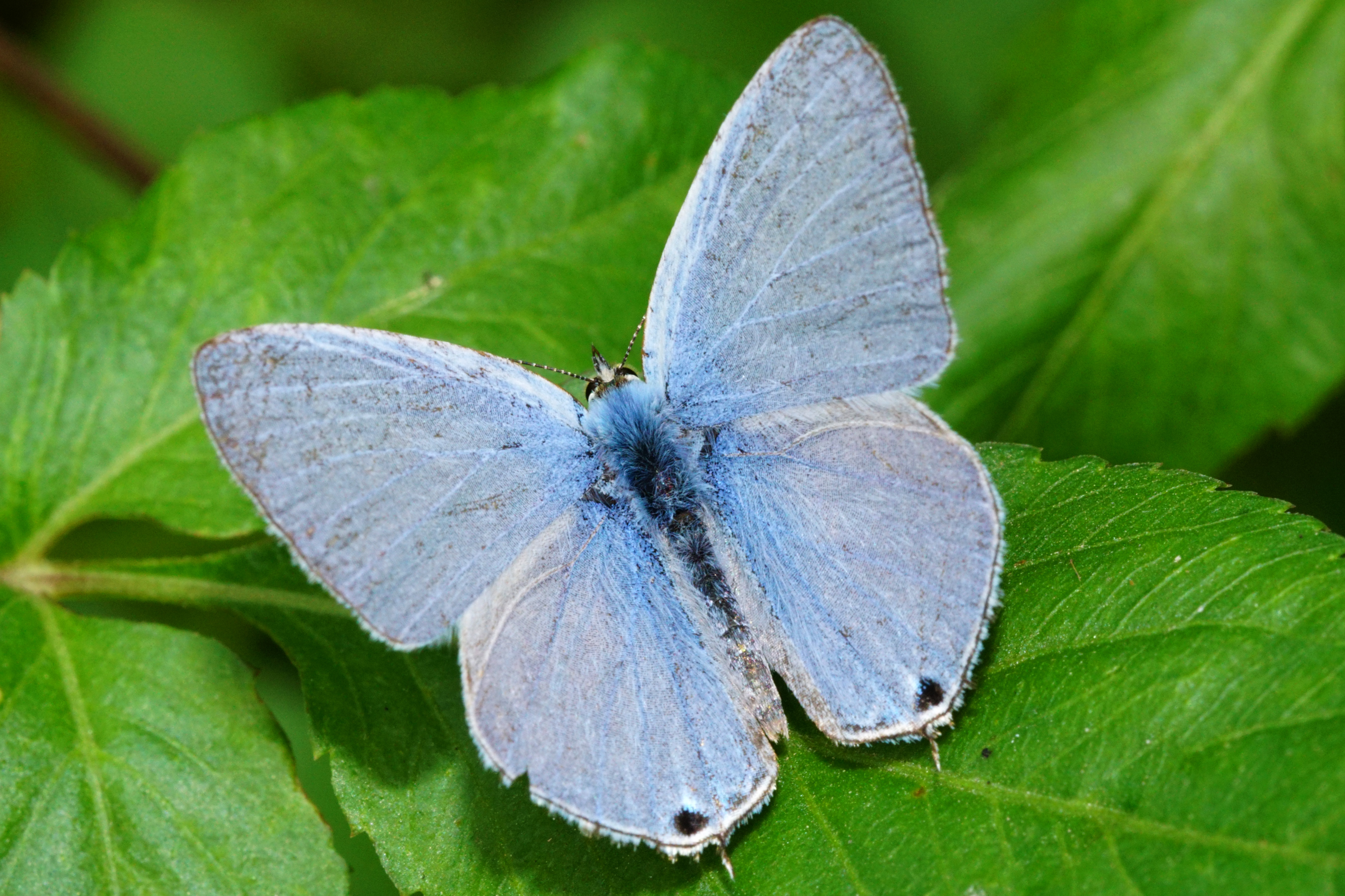 青珈波灰蝶 Catochrysops panormus exiguus